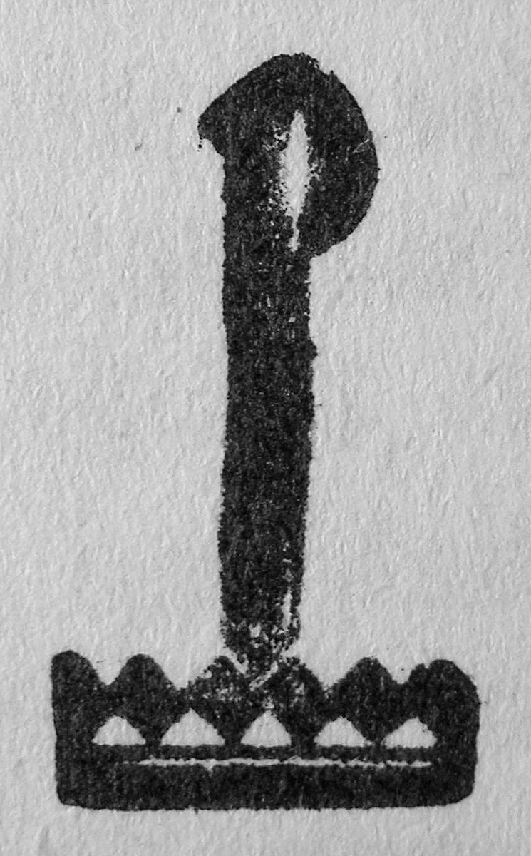 Pantheon Irodalmi Intézet emblémája